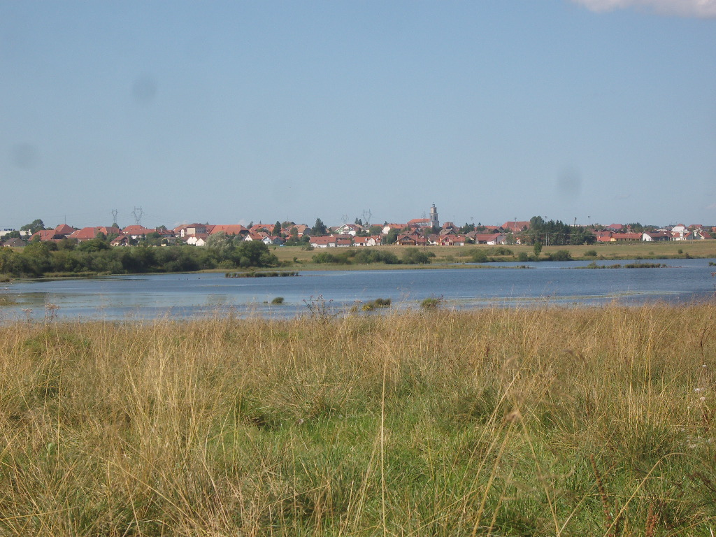 Vue générale du village de Frasne (Doubs - France), depuis le bord de l' "étang Lucien"